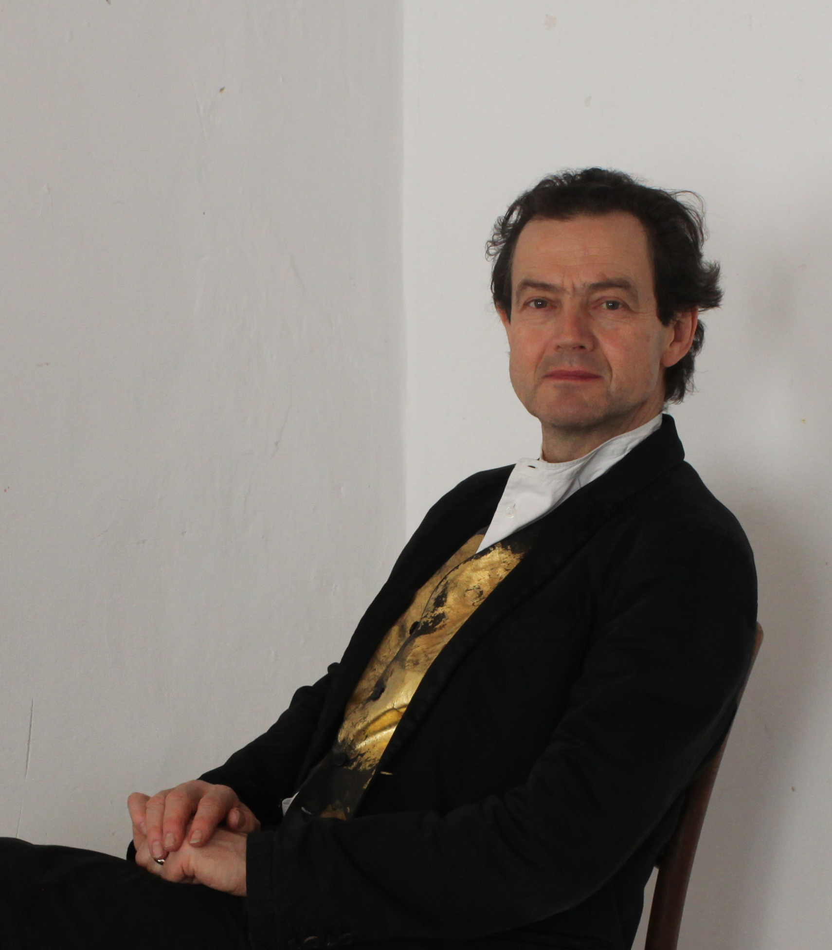 Rudolf Leitner-Gründberg - Portrait, Publikation - Katalog NY 2014